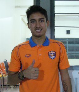 Patrick Reichelt